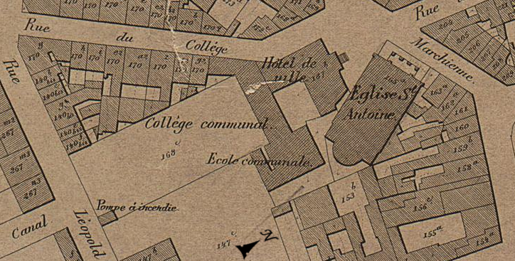 Charleroi (Belgique) - Localisation de Hôtel de Ville vers 1865. Extrait de l'atlas cadastral parcellaire de la Belgique, plus connu sous le nom de Plans Popp. Le lieu est actuellement occupé par le Passage de la Bourse et le café "Les mille colonnes".